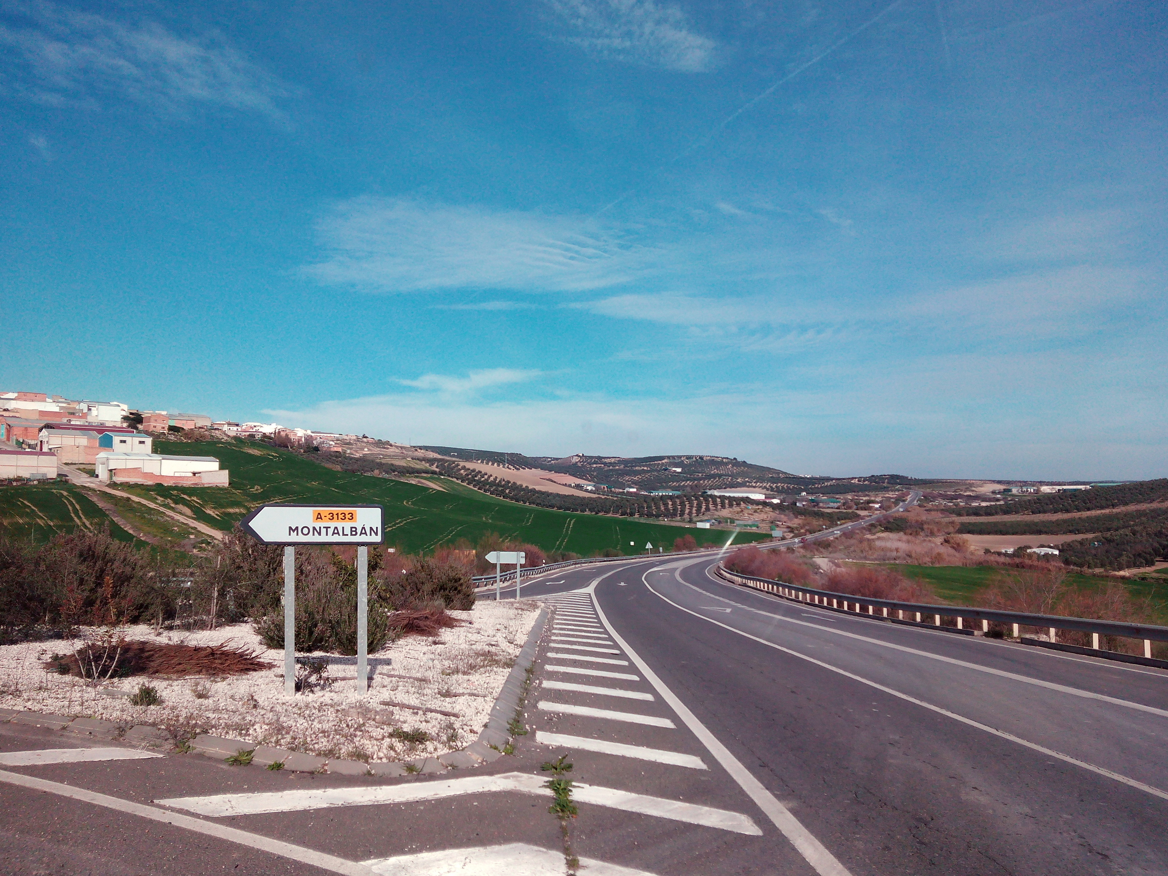 Carretera de entrada a Montalbán de Córdoba (España).